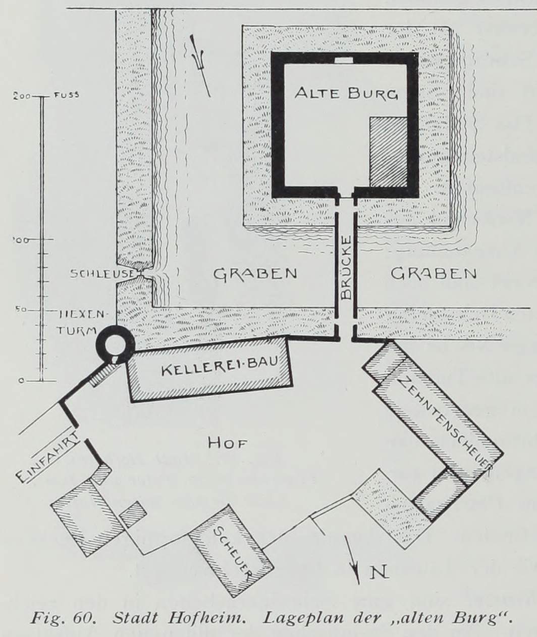 Stadt Hofheim Lageplan der alten Burg